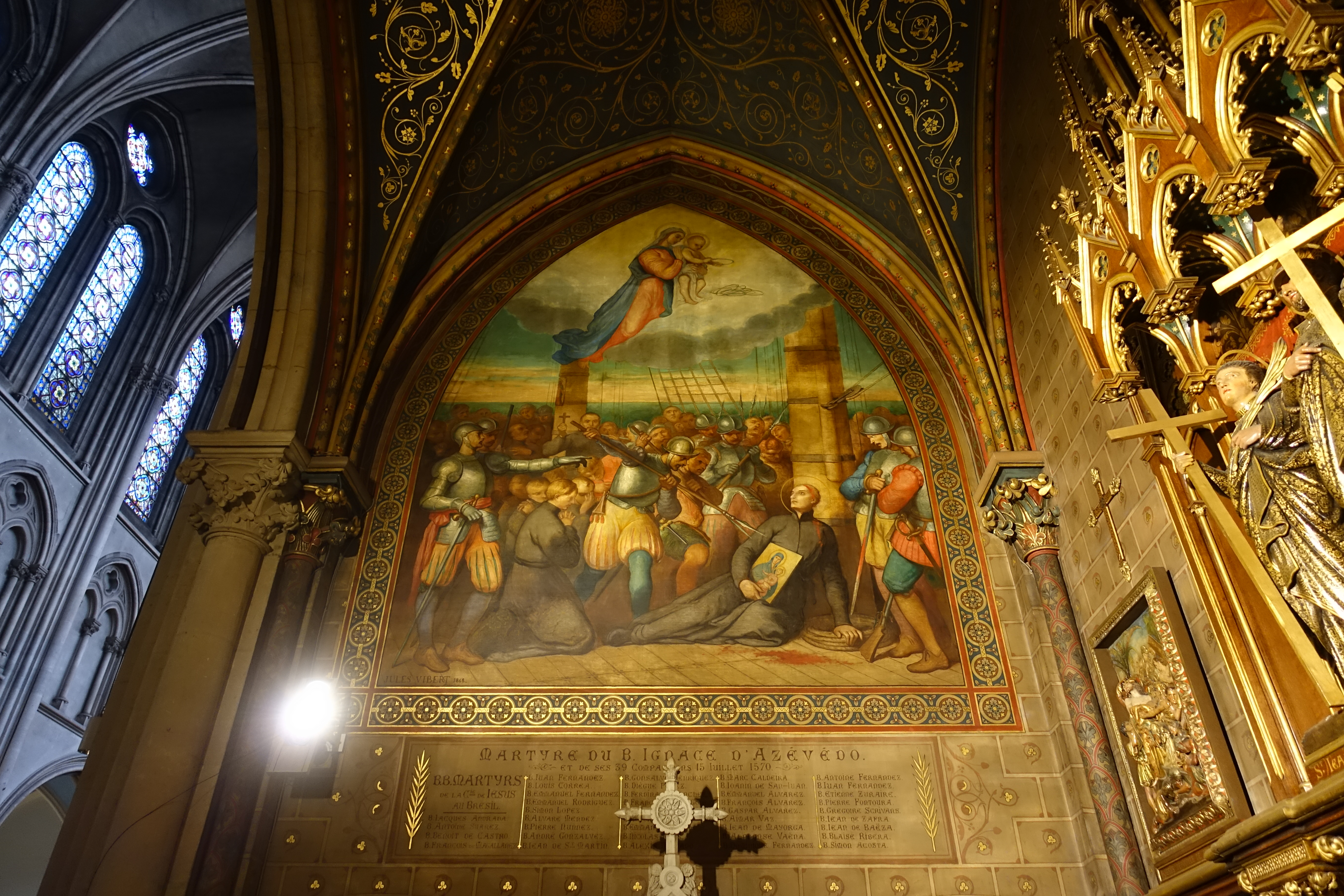 Death of Inácio de Azevedo @ Eglise Saint-Ignace @ Paris Église Saint-Ignace, 33 Rue de Sèvres, 75006 Paris, France.